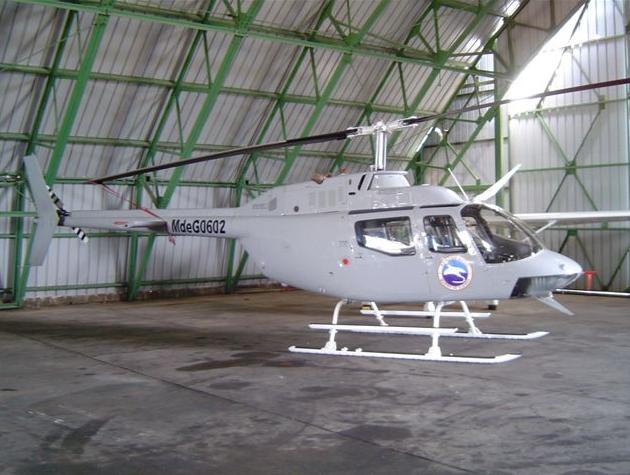 Helicoptero Marina de Guerra 0602